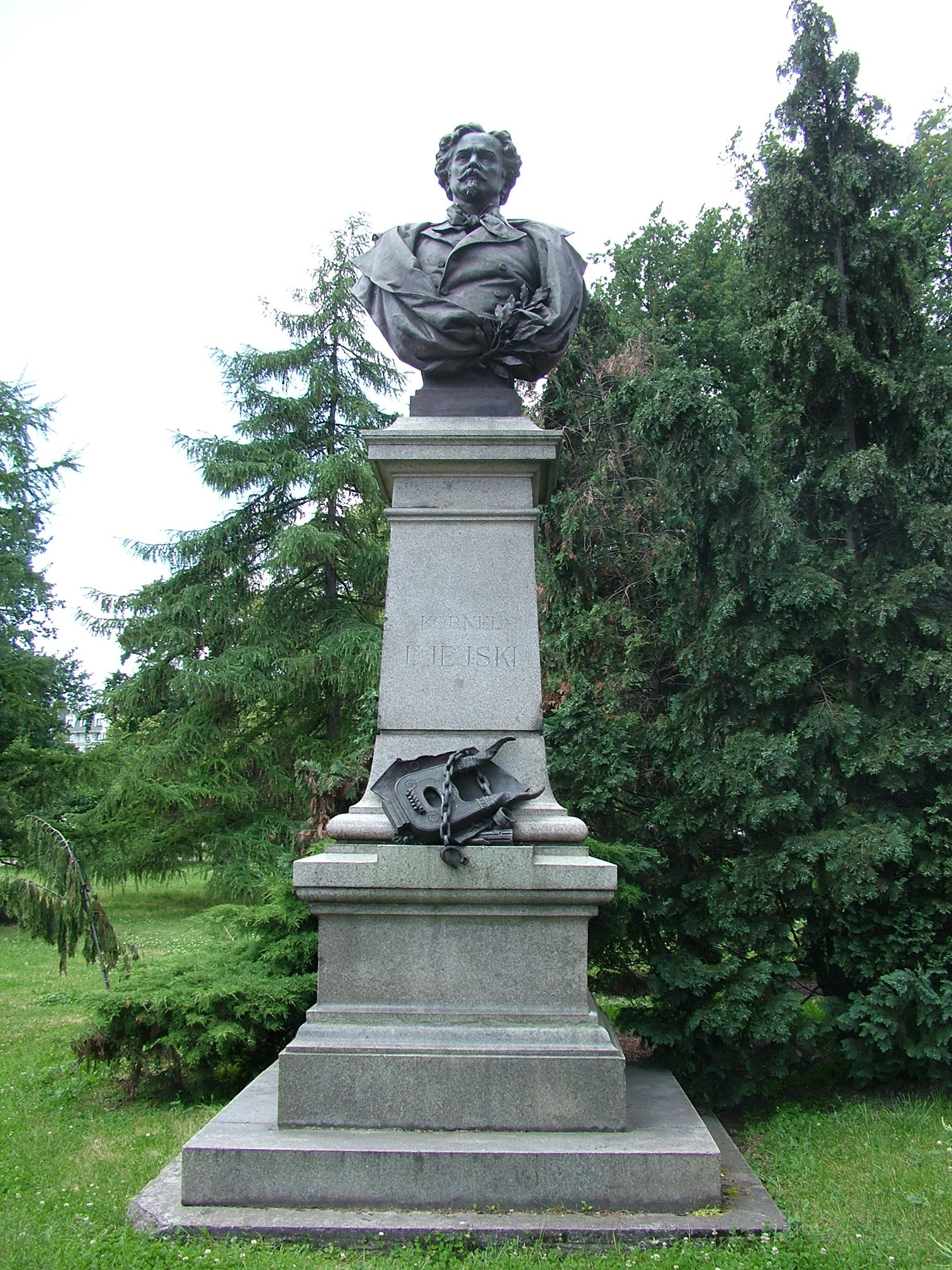 Monument of Kornel Ujejski by Antoni Popiel